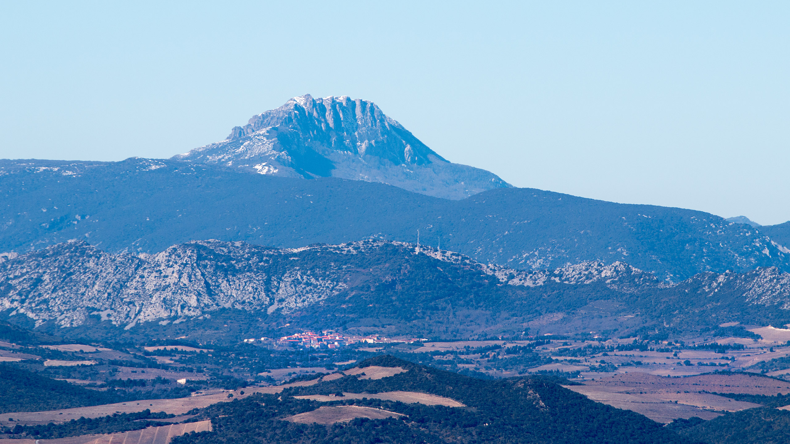 Vue depuis Força Réal